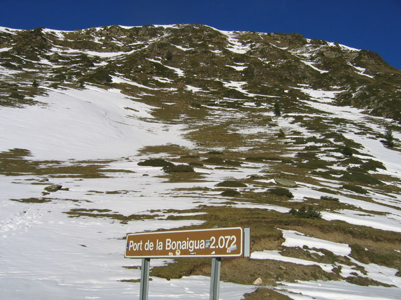 Port de la Bonaigua (Pòrt dera Bonaigua)